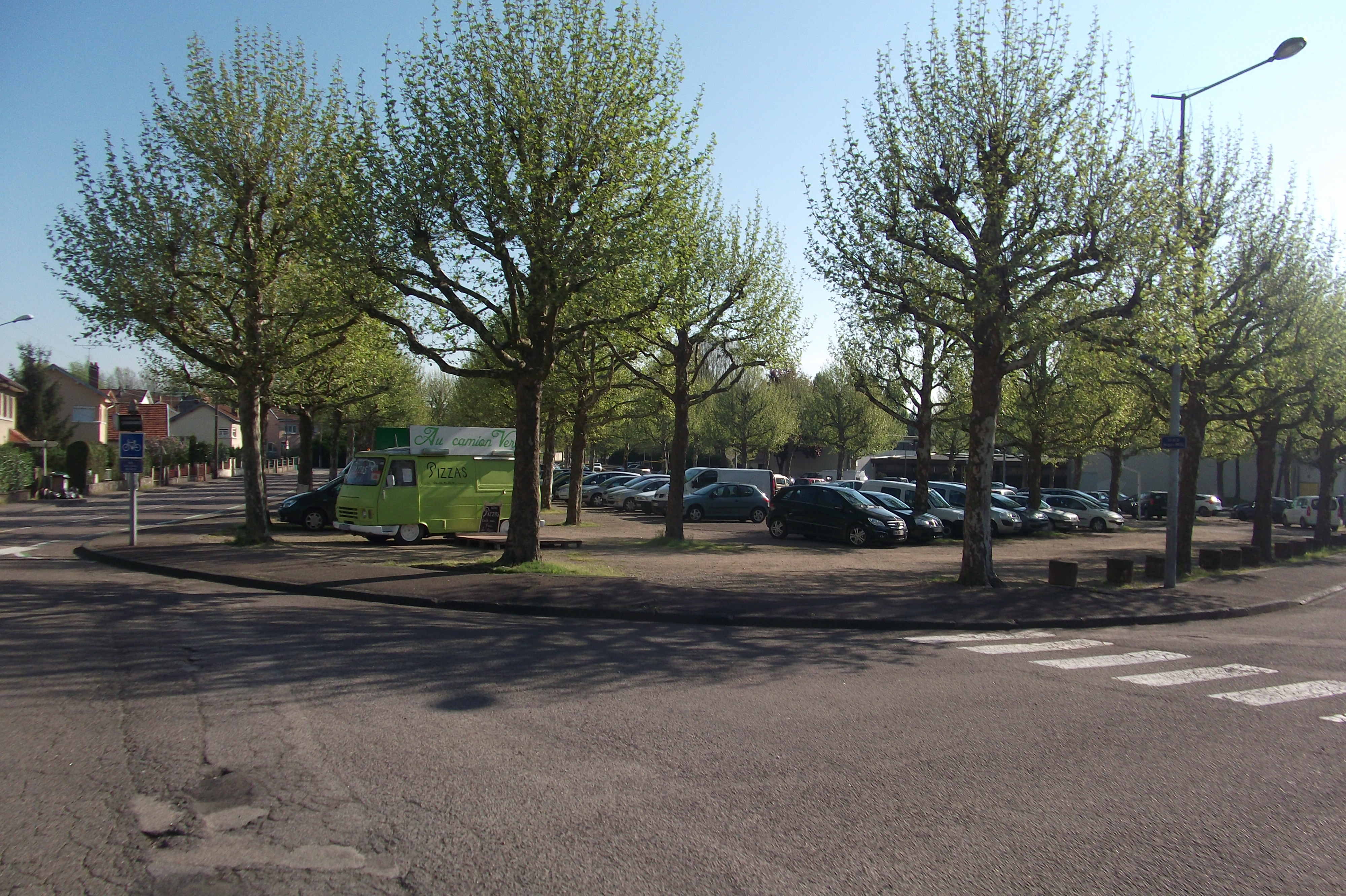 La place Jacques Brel de Vesoul (Haute-Saône, Franche-Comté, France).